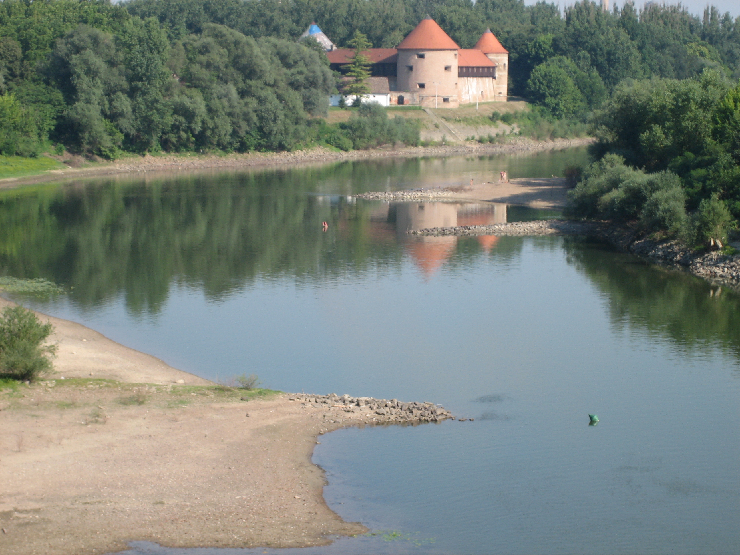 The Fortress of Sisak, by river Kupa, Croatia. / Sisački Stari grad uz rijeku Kupu.